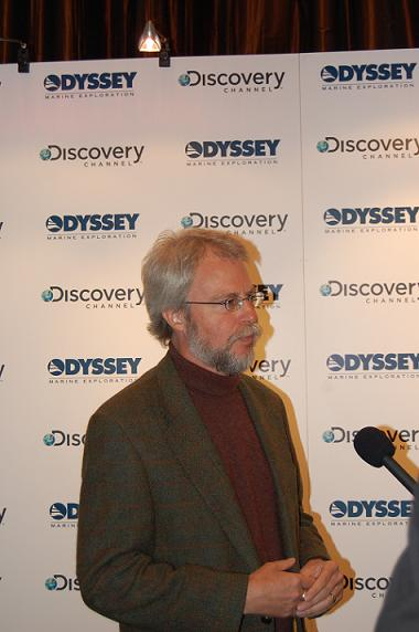 Grundare och vd av Odyssey Marine Exploration Gregg Stemm